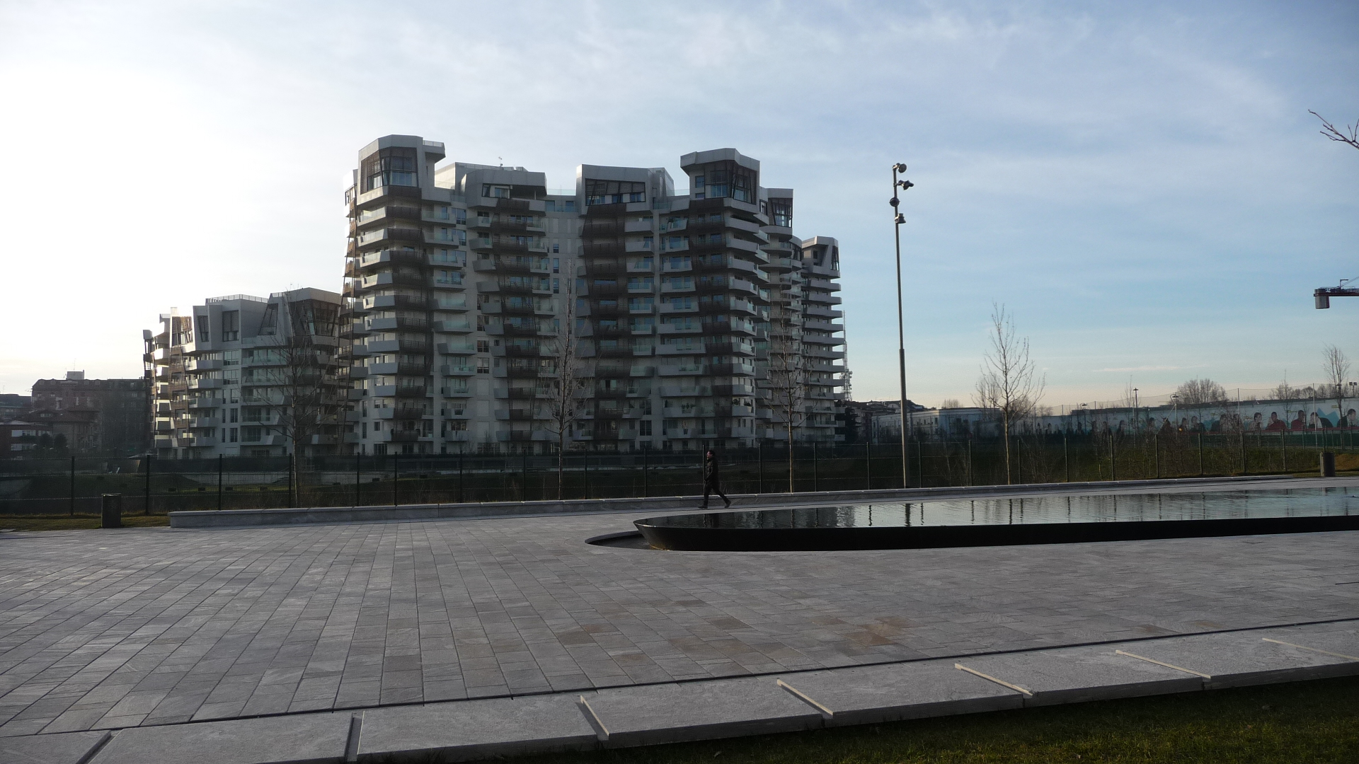 Veduta delle Residenze firmate da Daniel Libeskind facenti parte il progetto CityLife